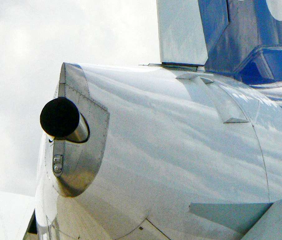 Airbus A380